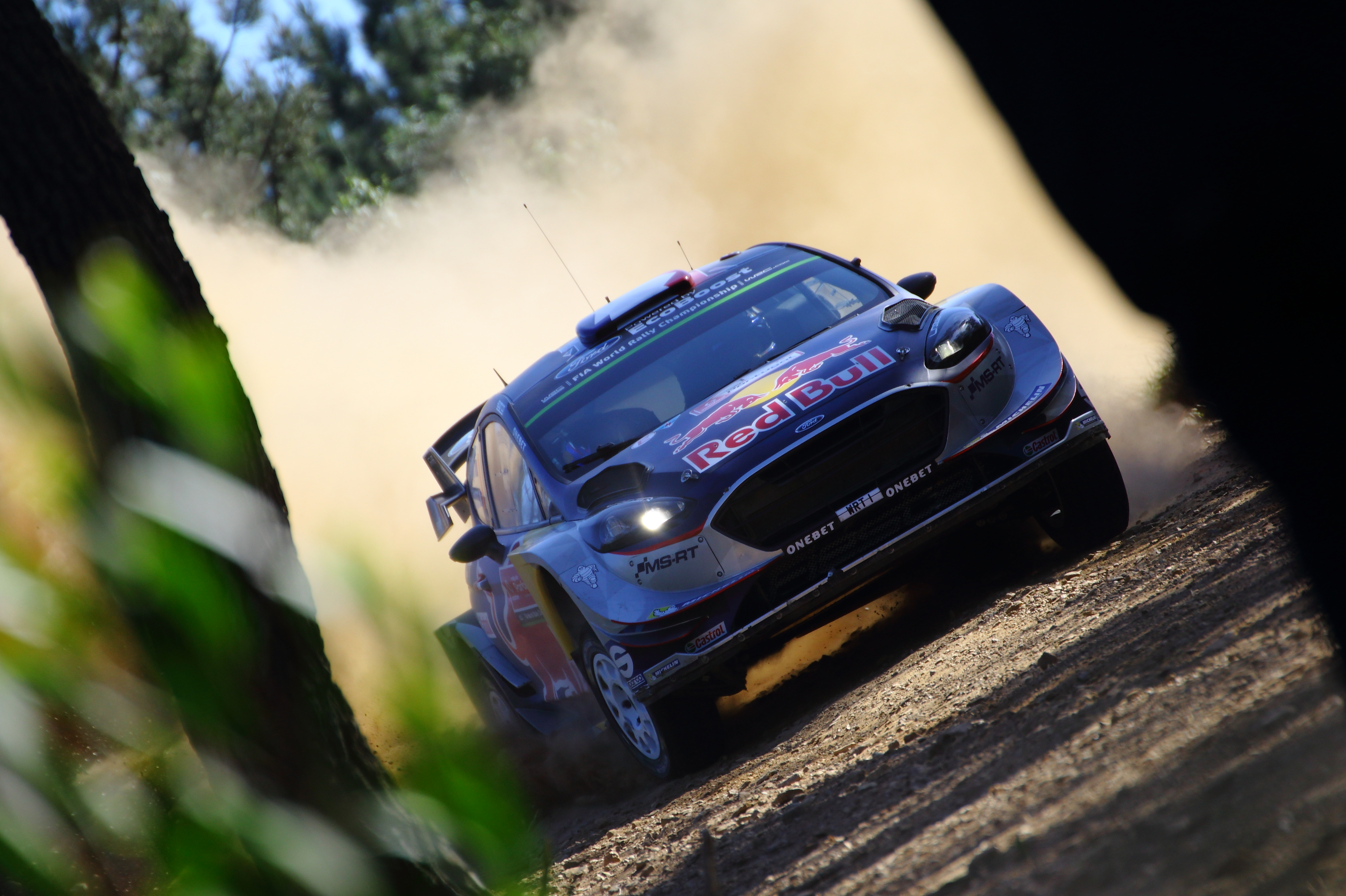 2017 Rally Portugal